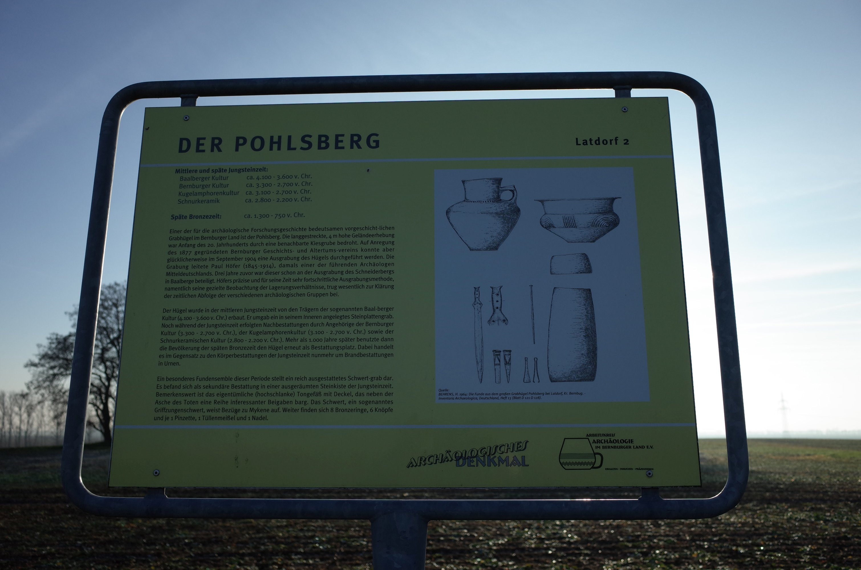 Nienburg (Saale), Ortsteil Latdorf, Grabhügel Pohlsberg. Informationstafel vom Arbeitskreis Archäologie im Bernburger Land e.V.[1]